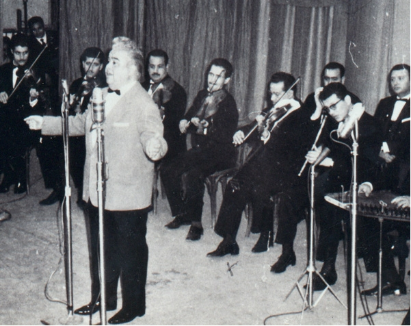 Portrait du chanteur tunisien Ali Riahi et son orchestre en représentation